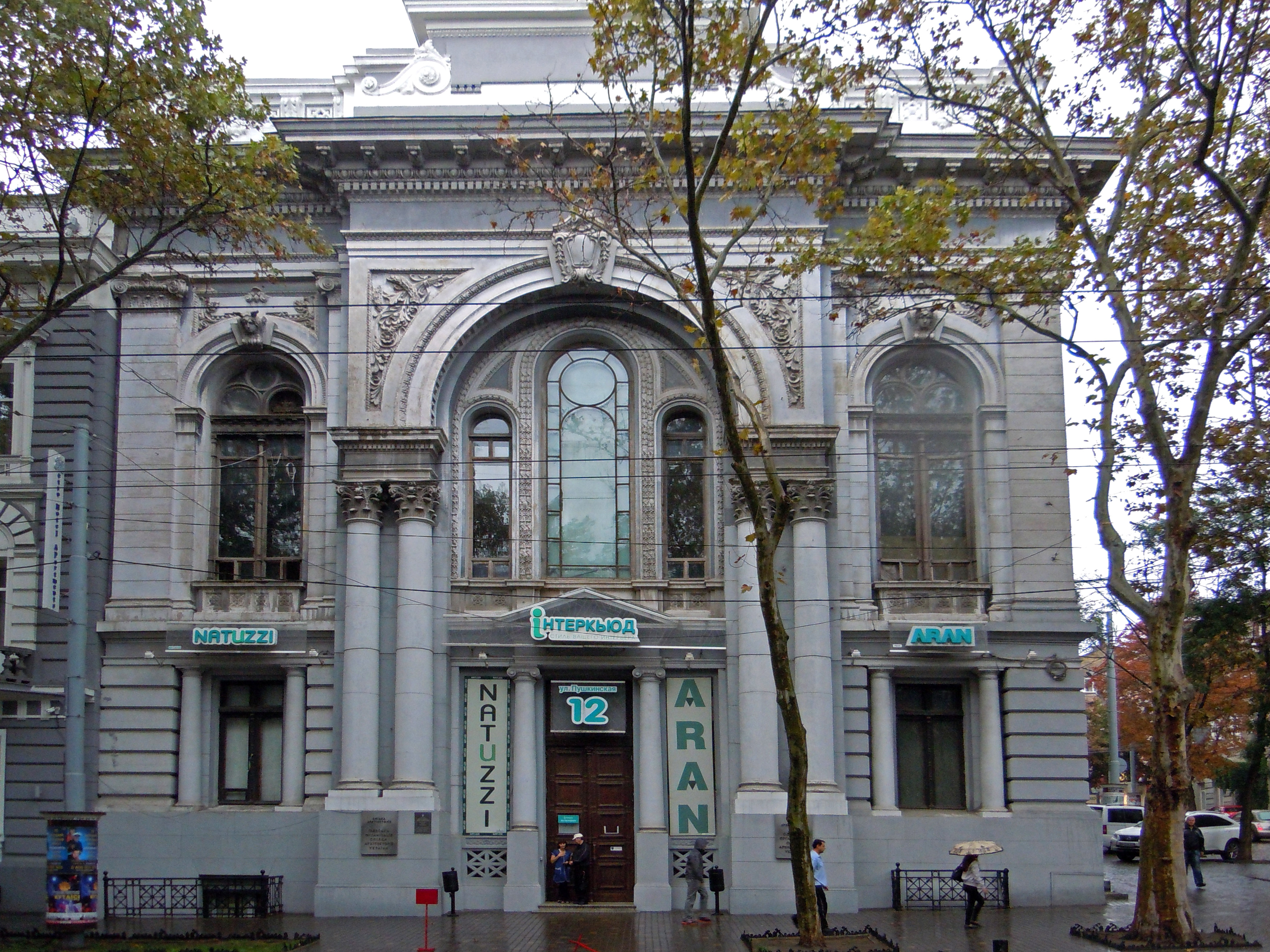 Будівля Облікового банку, Одеса, Пушкінська вул., 12/13 (ріг вулиць Пушкінської, 12 та Грецької, 13